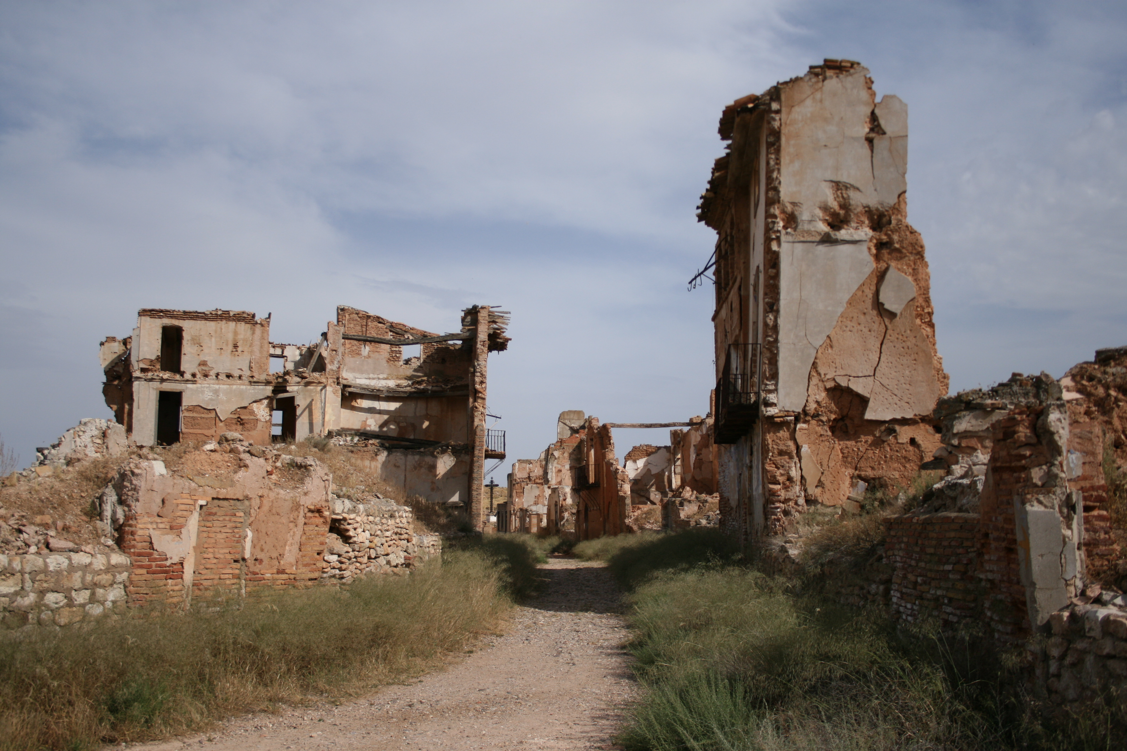 Calle principal de Belchite